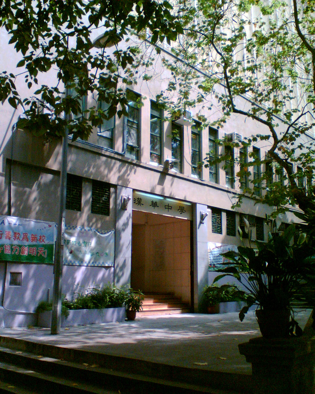 中文（香港）: 位於西環青蓮臺的舊校舍。